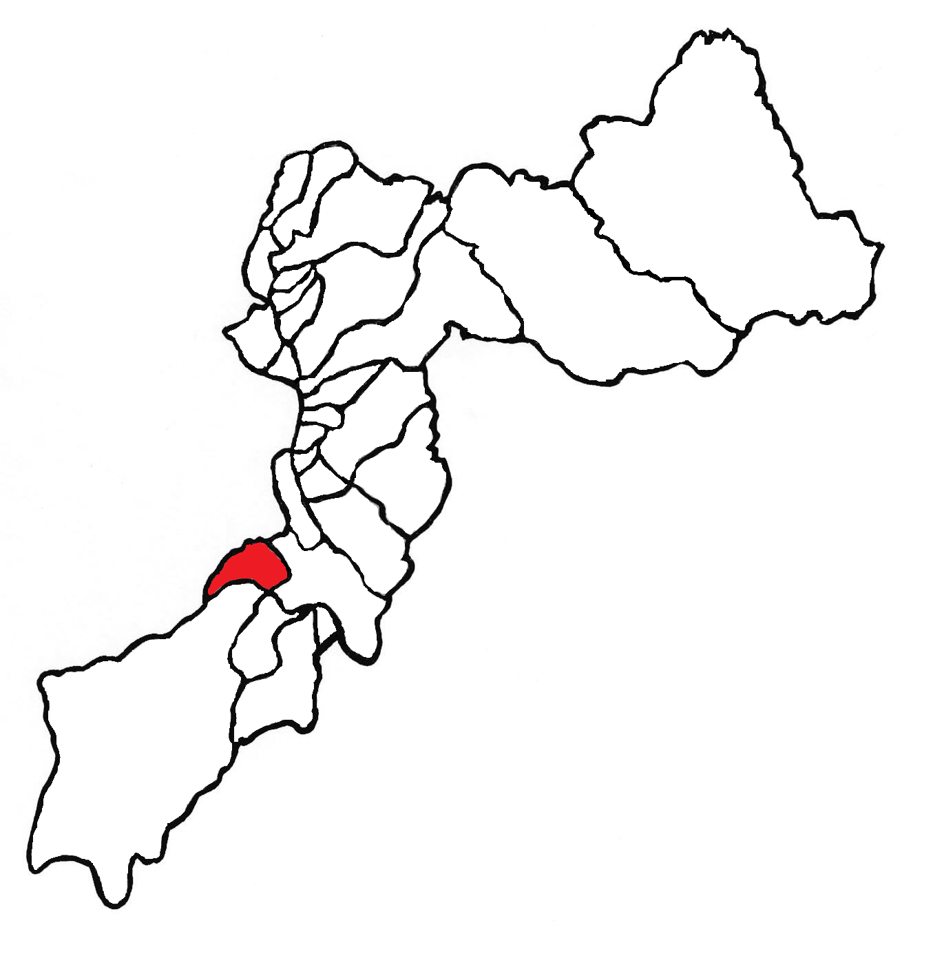 Ubicación del distrito en la provincia de Huancayo, departamento de Junín, Perú